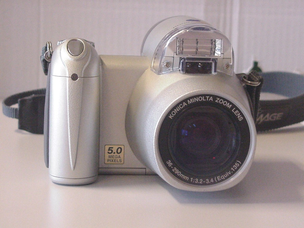 Appareil photographique numérique Minolta Dimage Z20 - Vue de face